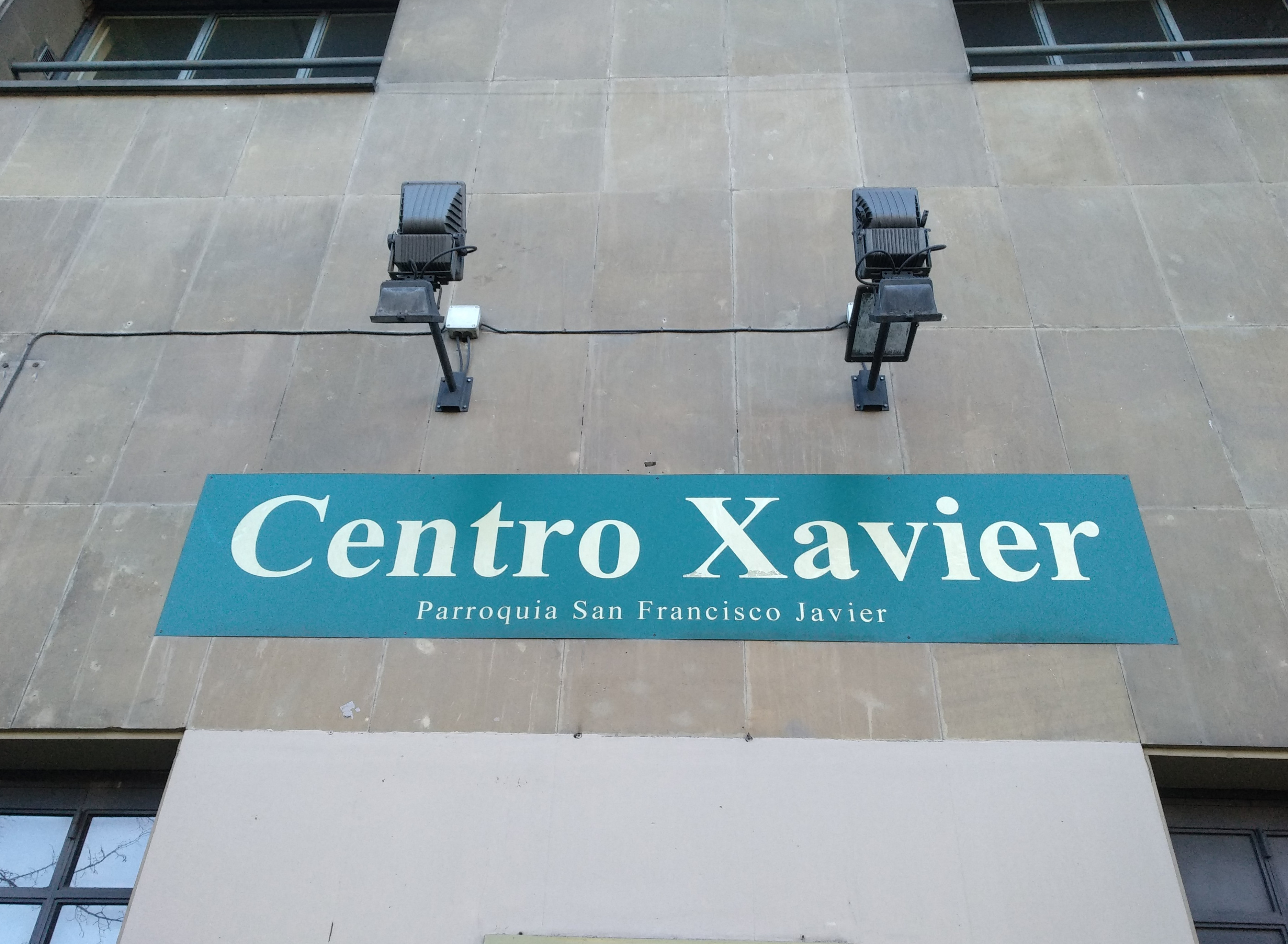 Centro Xavier (Parroquia de San Francisco Javier - Pamplona)